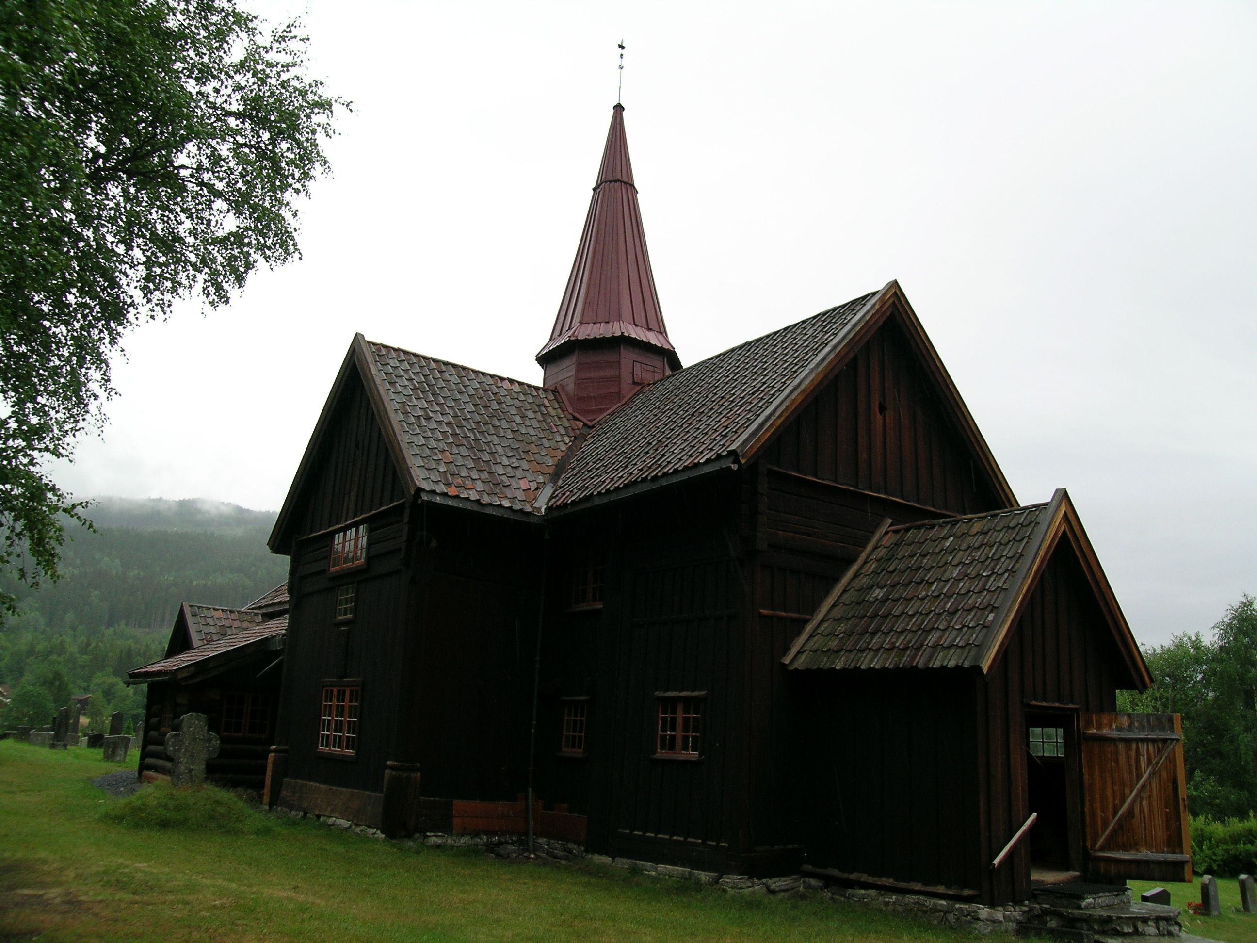 Rollag stavkirke. Rollag, Buskerud, Norway.